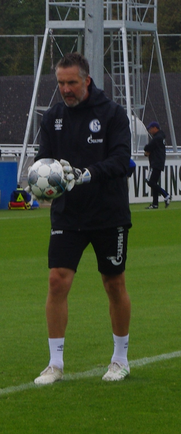 Simon Henzler (2019)